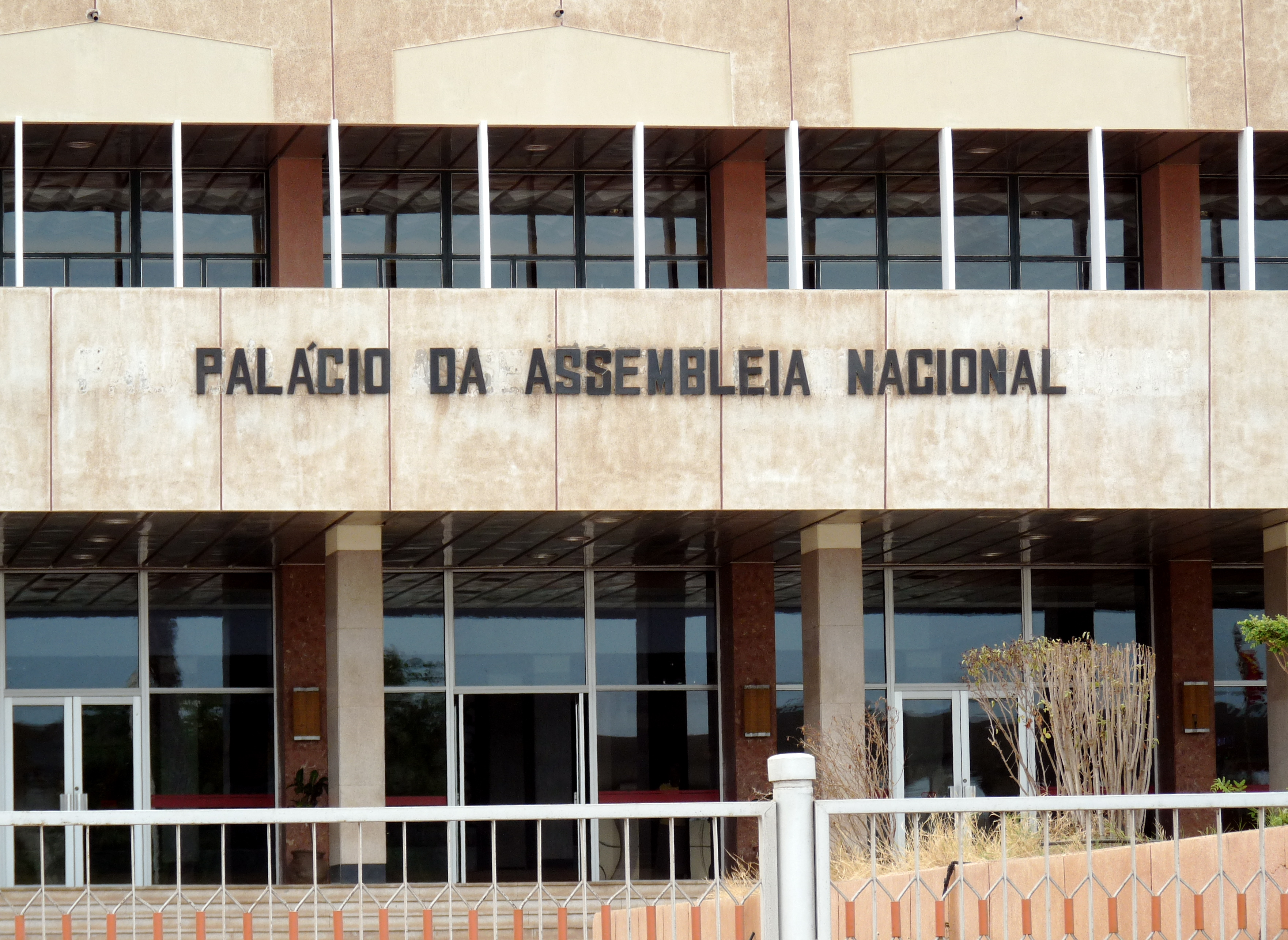 Palacio da Assembleia nacional. Cidade da Praia, Ilha de Santiago - Cabo Verde Este edifício, bem como alguns outros, foi construído pelos chineses. São eles também, responsáveis pela construção do que será o maior, se não o único, centro comercial de Cabo Verde, na zona da Prainha, bem em cima do mar!!...